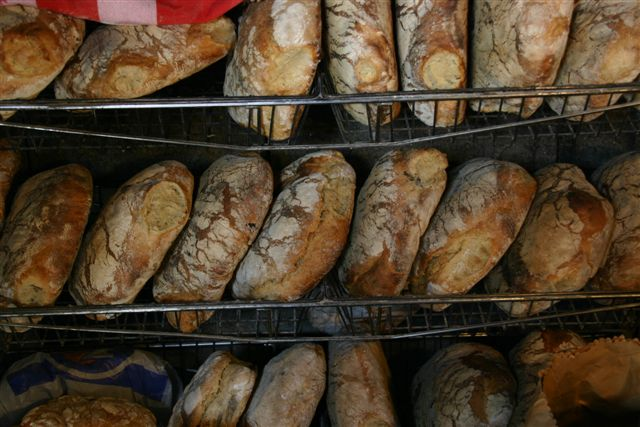 Pão de centeio de Chaves (Portugal). Especialidade gastronómica transmontana.